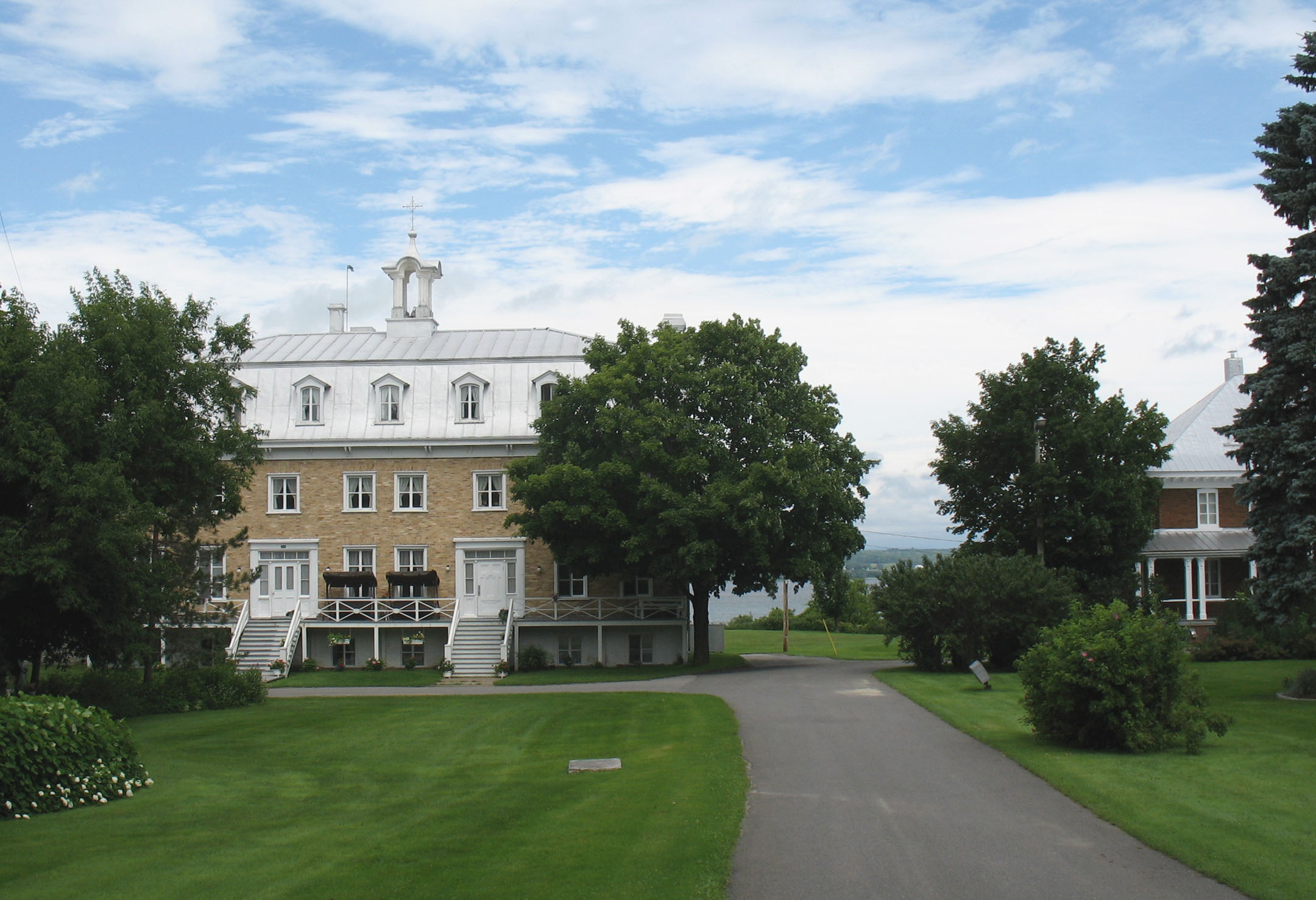 Ensemble paroissial. Lotbinière. Province de Québec. Canada.